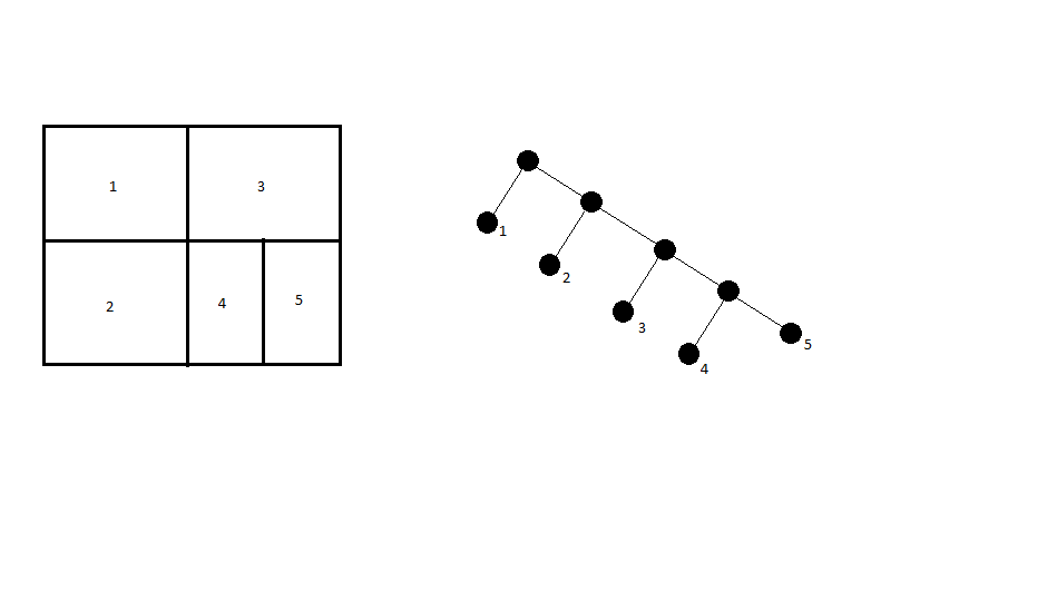 Arbol de CAN